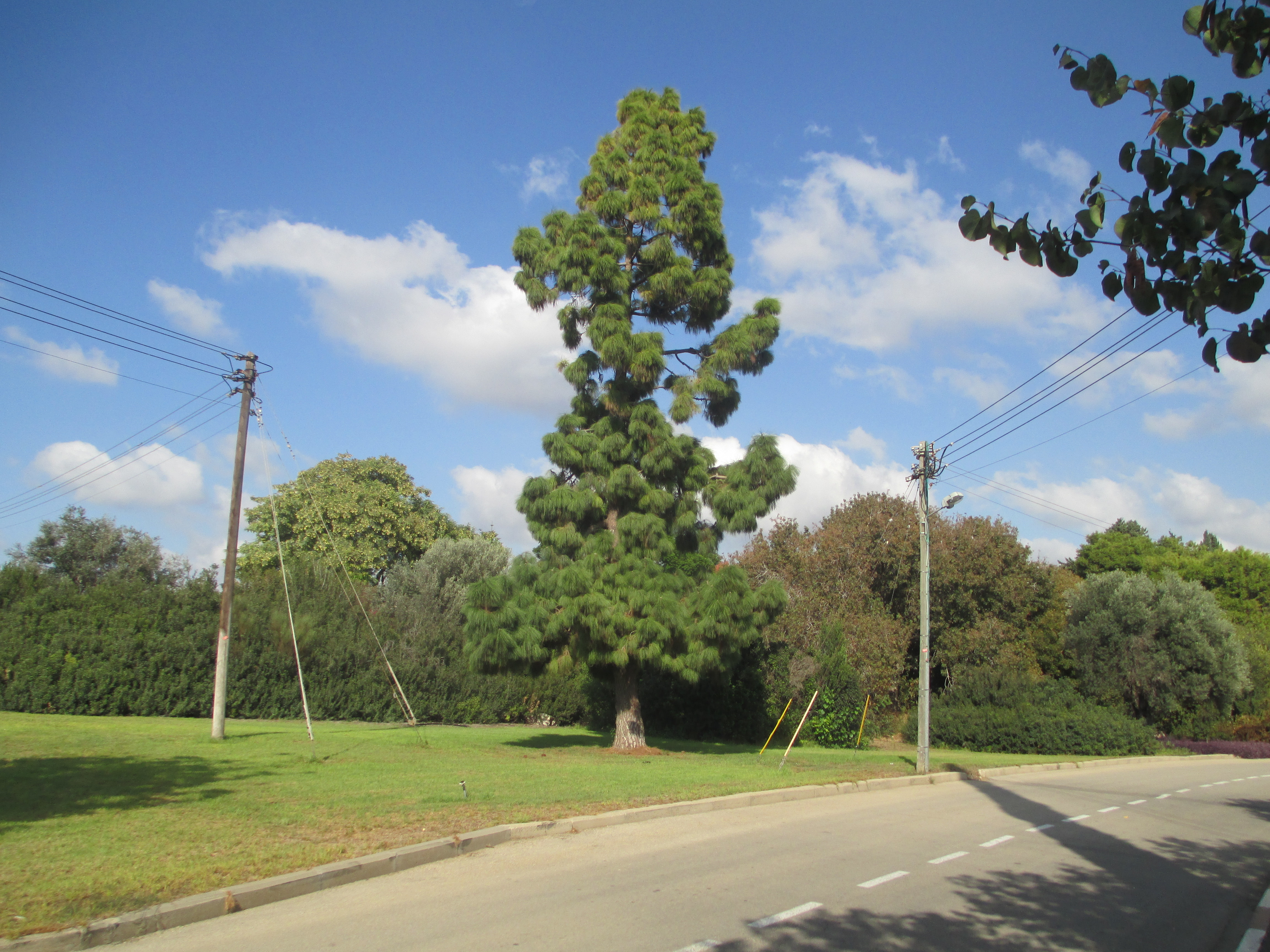 אורן קנרי בקיבוץ בית העמק